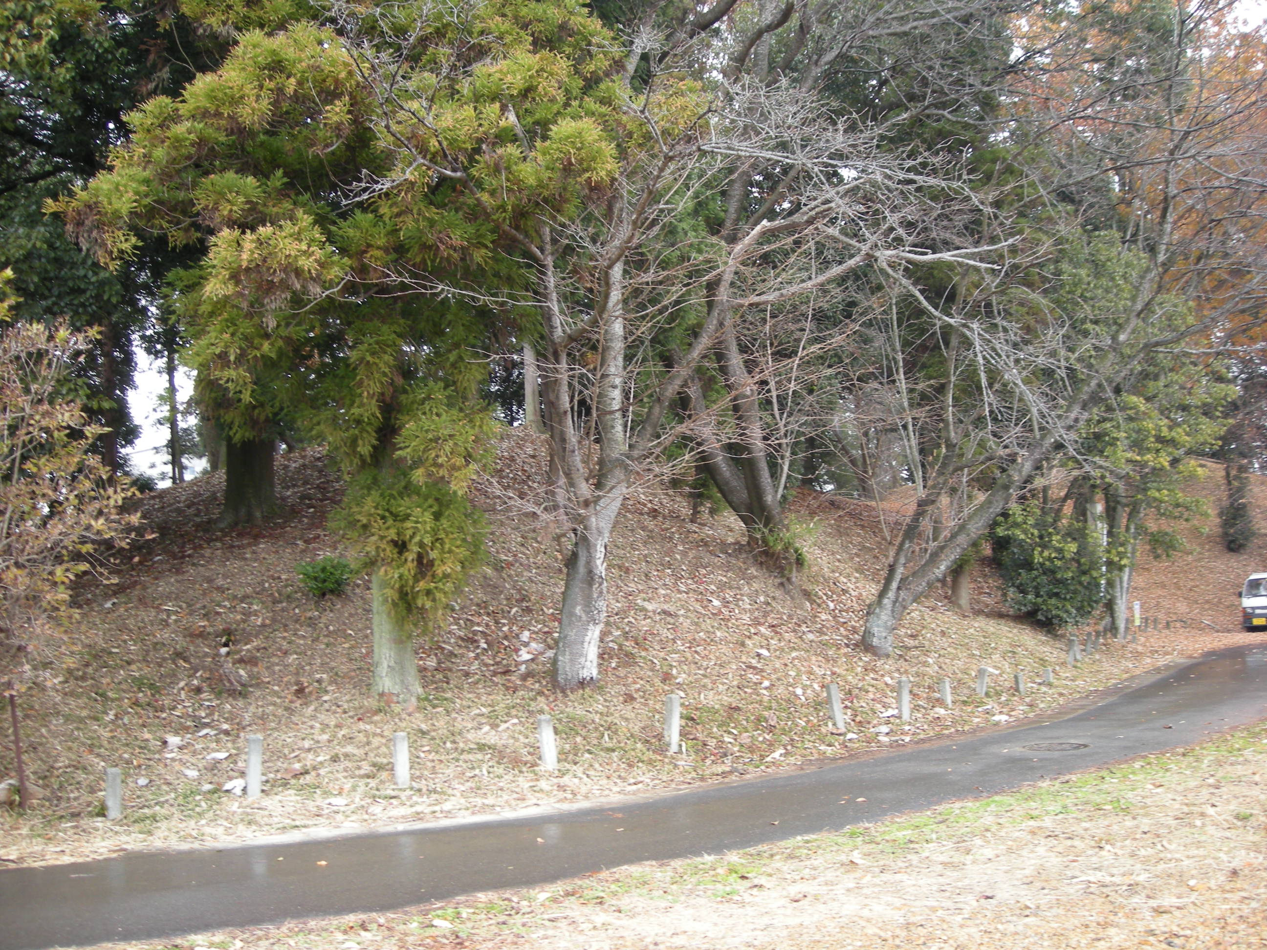 Nagatsukakofun（長塚古墳）